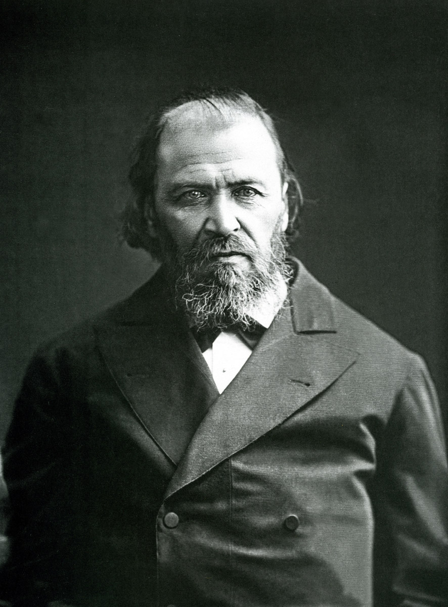 Portrait of Yakov Polonsky